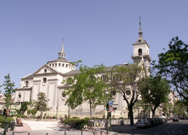 Iglesia del Santísimo Cristo de la Victoria. Calle de Fernando el Católico. Proyecto de Ignacio Fiter Claré de 1946. Primera fase realizada en 1955, segunda fase en 1963.